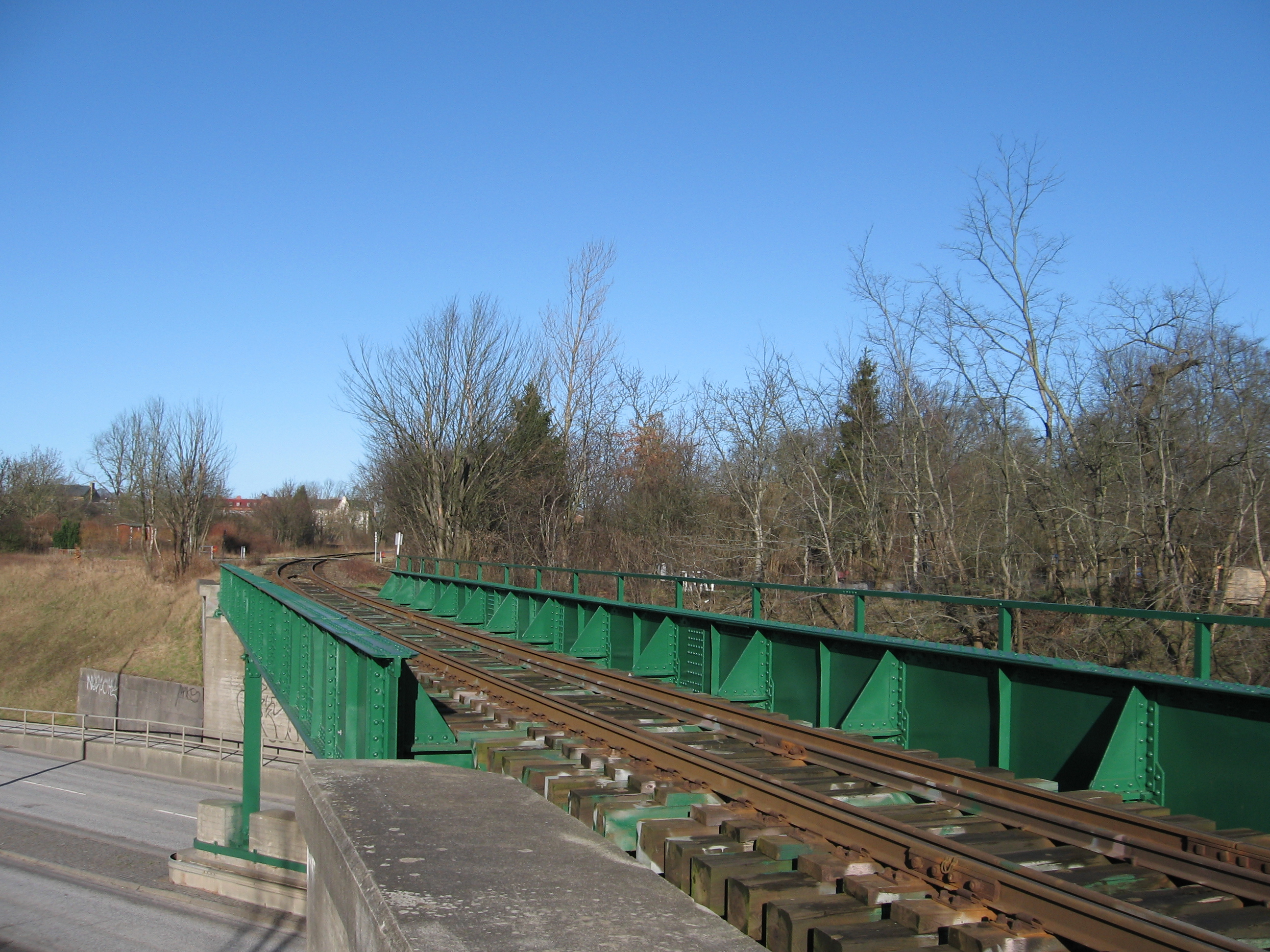 Järnvägsbro i Lund. En nitad stålbalkbro uppförd 1936 för Lund-Trelleborgs järnvägs räkning som går över Ringvägen, mellan Stadsparken och Klostergården.